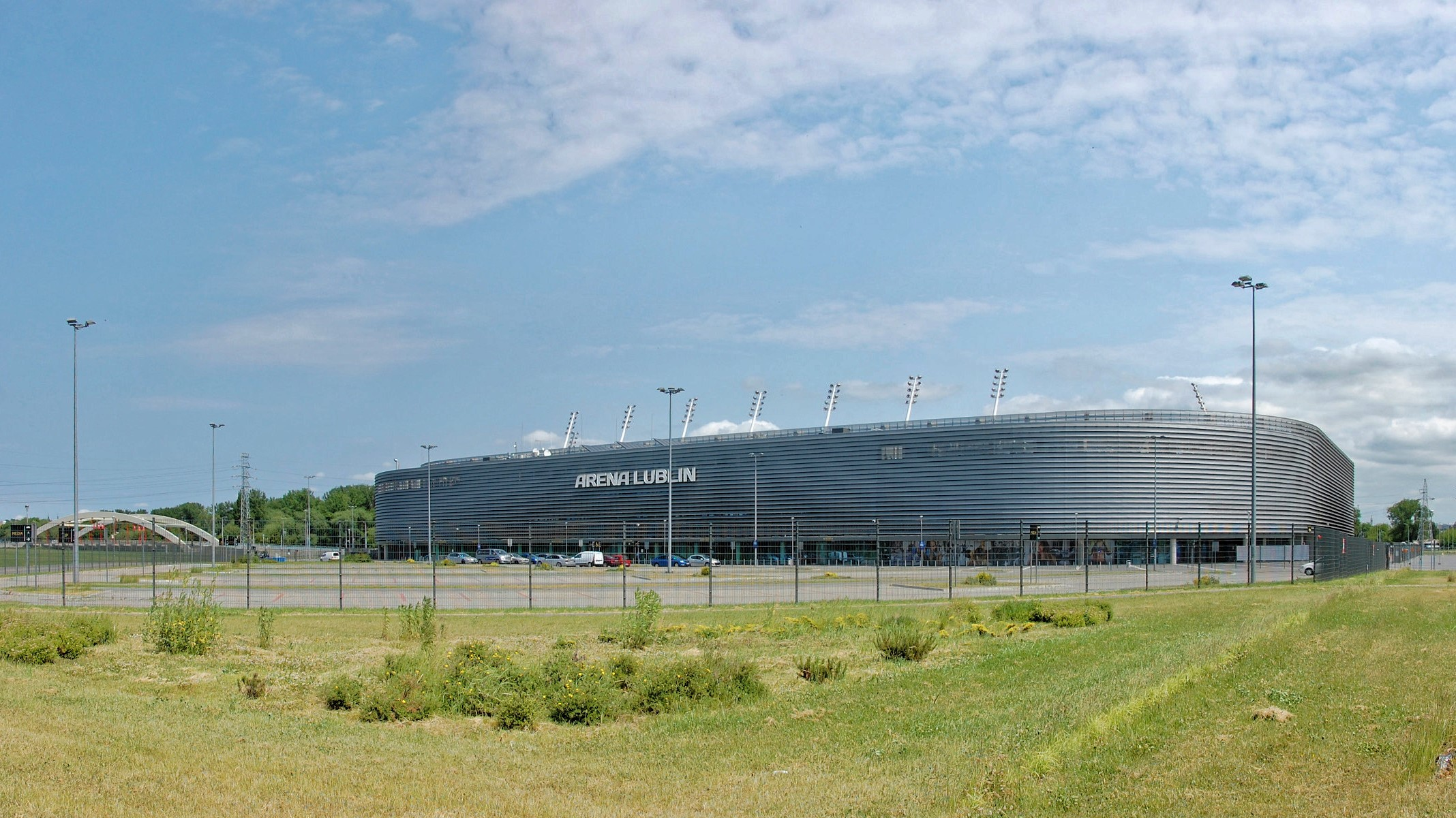 Arena Lublin, po lewej Most 700-lecia Lublina